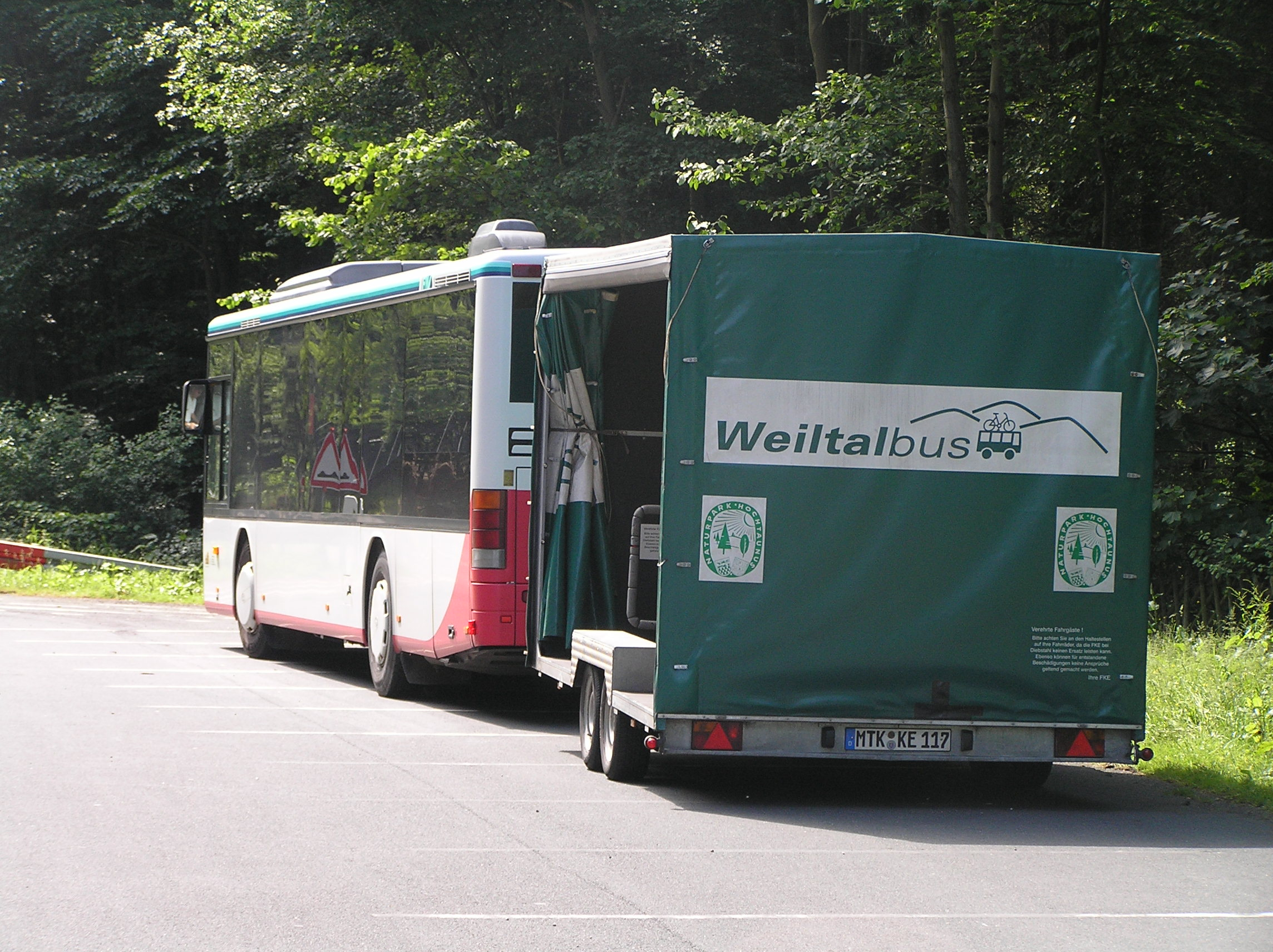 Der Weiltalbus bringt im Sommer Fahrradfahrer auf den Großen Feldberg.